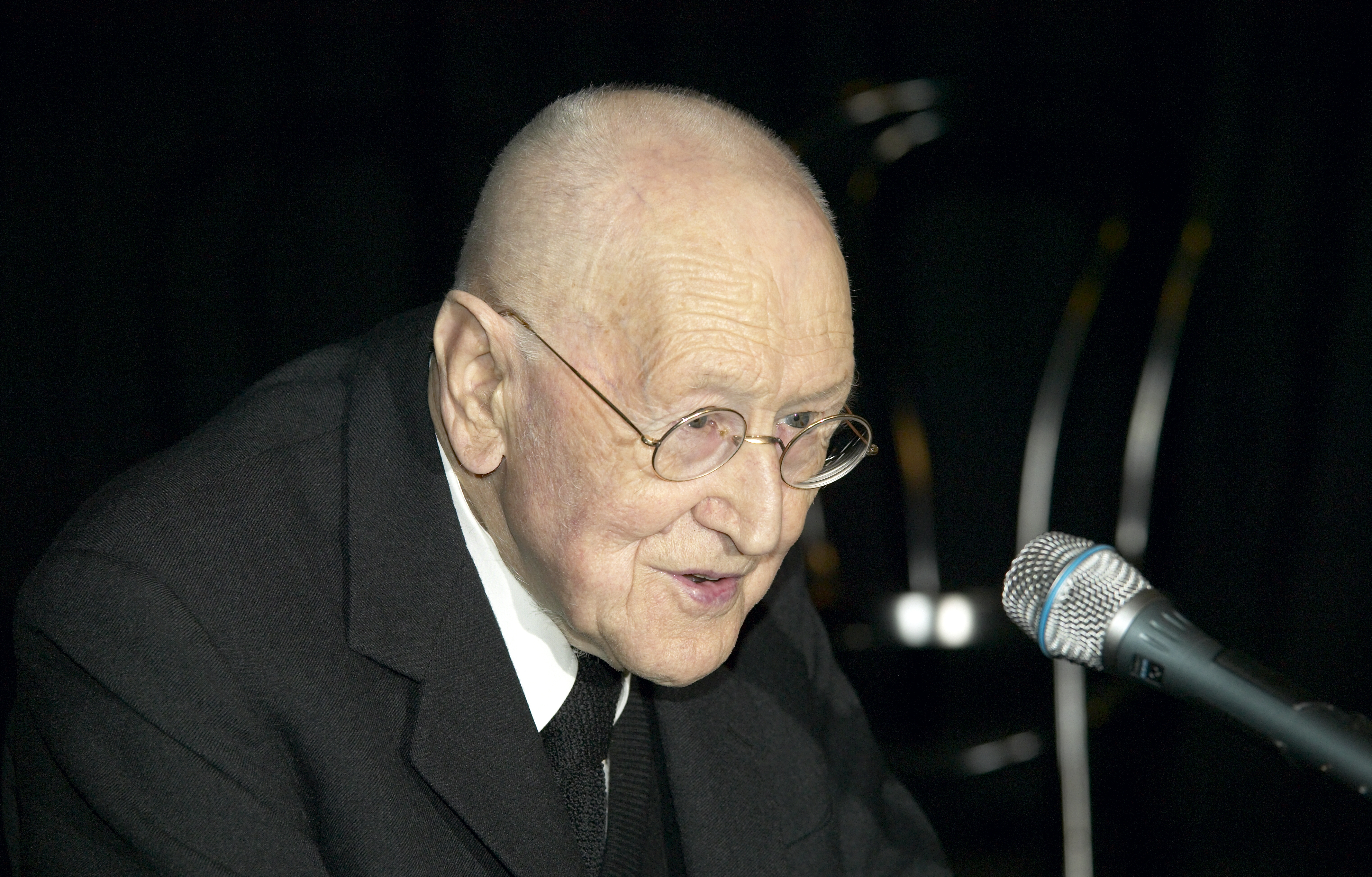 Dr. Gerhard Aßfahl am 20.04.2004